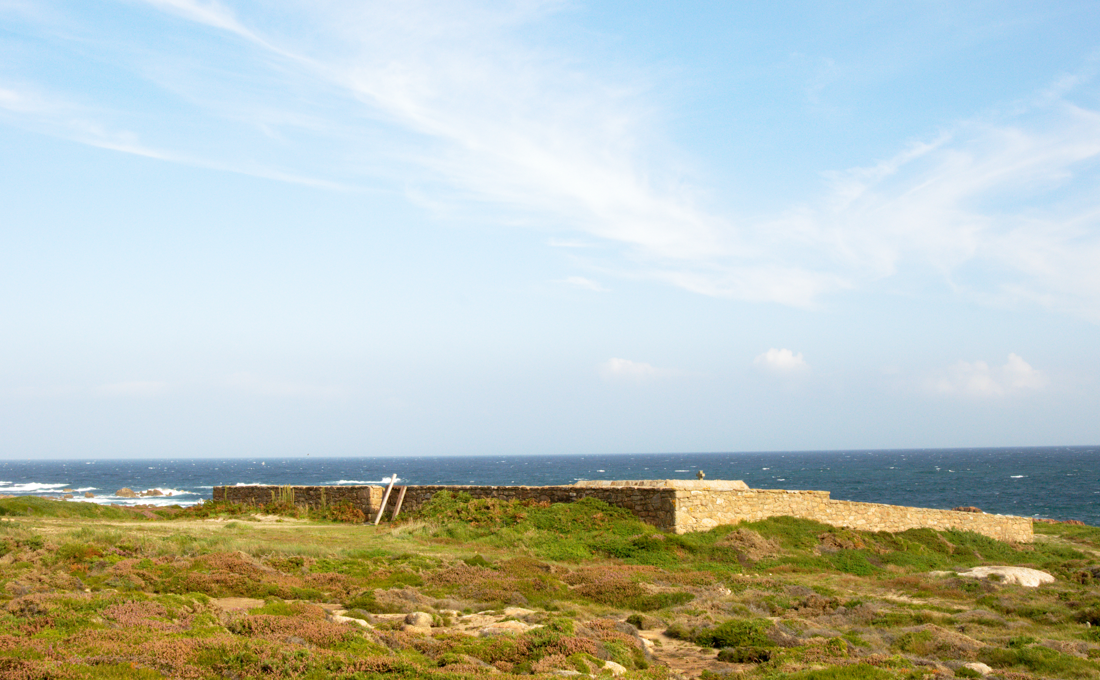 Cementerio de los Ingleses, Camariñas, Galicia